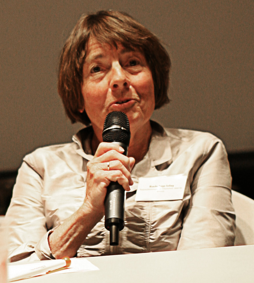 Kristin Frogn hadde tidligere på dagen en gripende innlegg om å være pårørende. Wenche Frogn Sellæg, geriatriker og leder for Rådet for demens, hadde innlegg på seminaret og hun var også deltager i debatten til slutt. (Foto: Oskar Seljeskog/Oslo Museum)